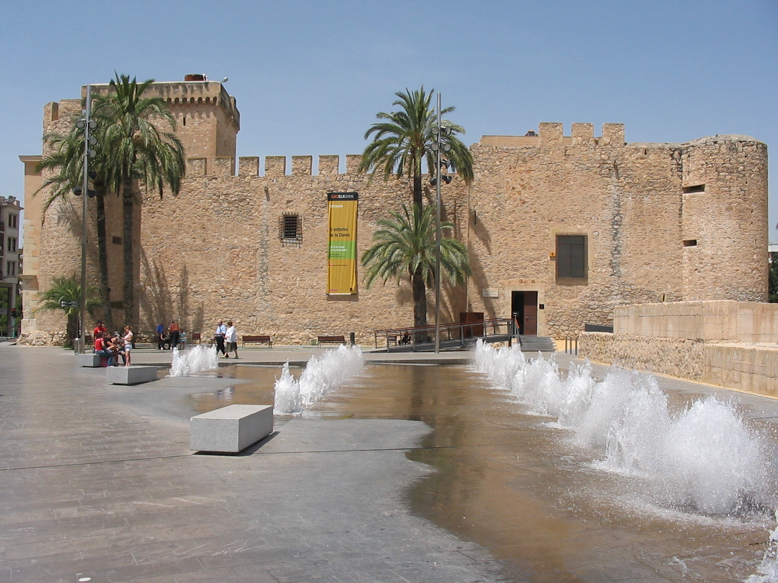 Castell-Palau d'Altamira, a Elx.